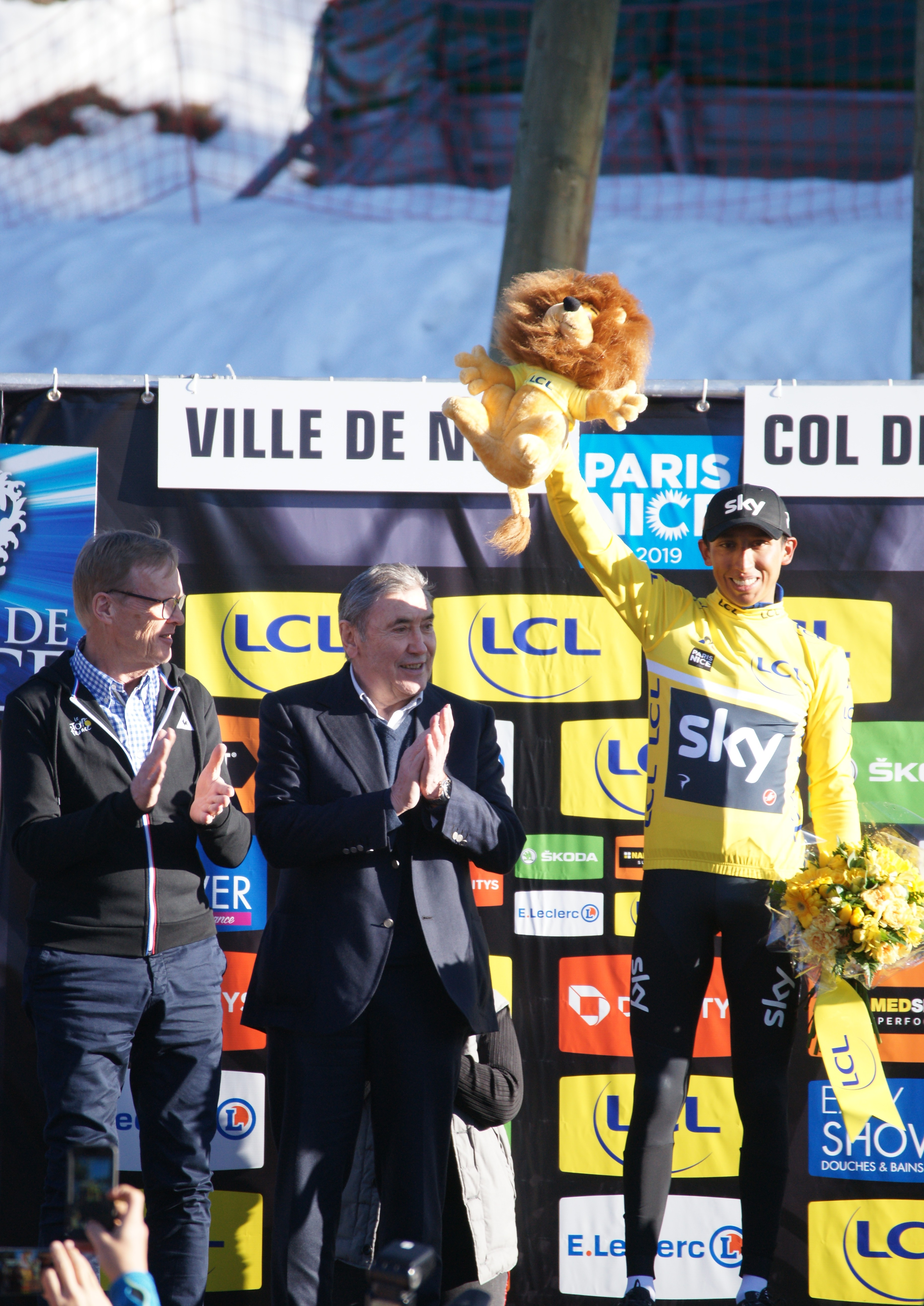 Egan Bernal, jaune, Paris-Nice 2019